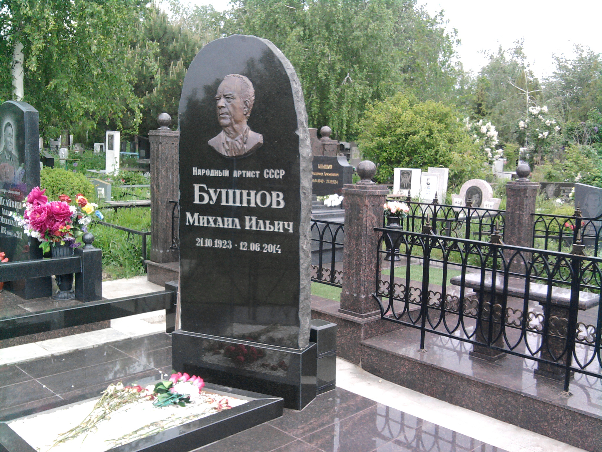 Памятник на могиле народного артиста СССР Бушнова Михаила Ильича